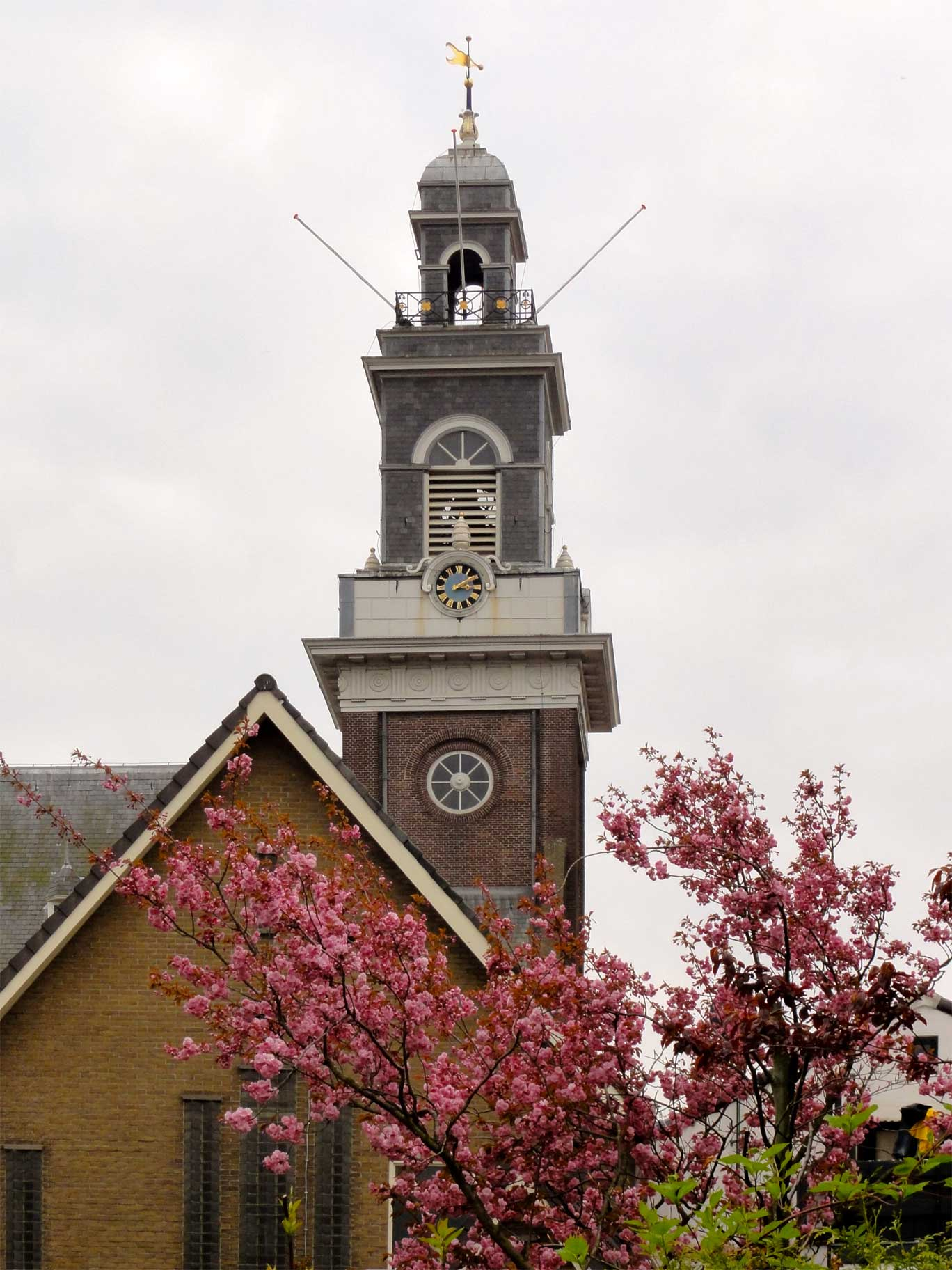 Kerktoren van de Grote of Johanneskerk van Lekkerkerk